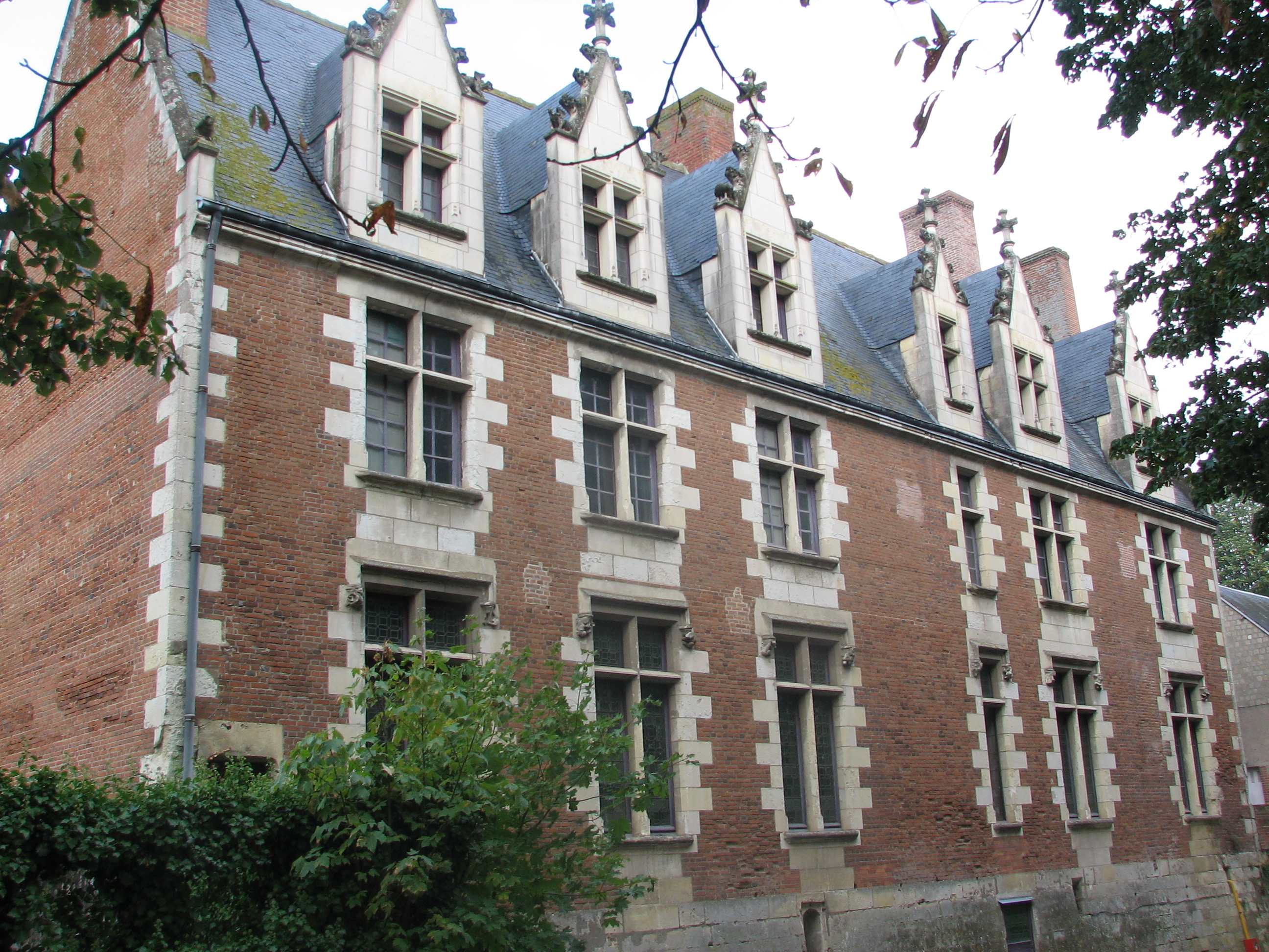 Château de Plessis-lès-tours, La Riche, France